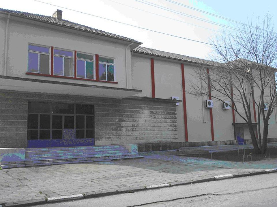 Сградата на НЧ Просвета 1927г.